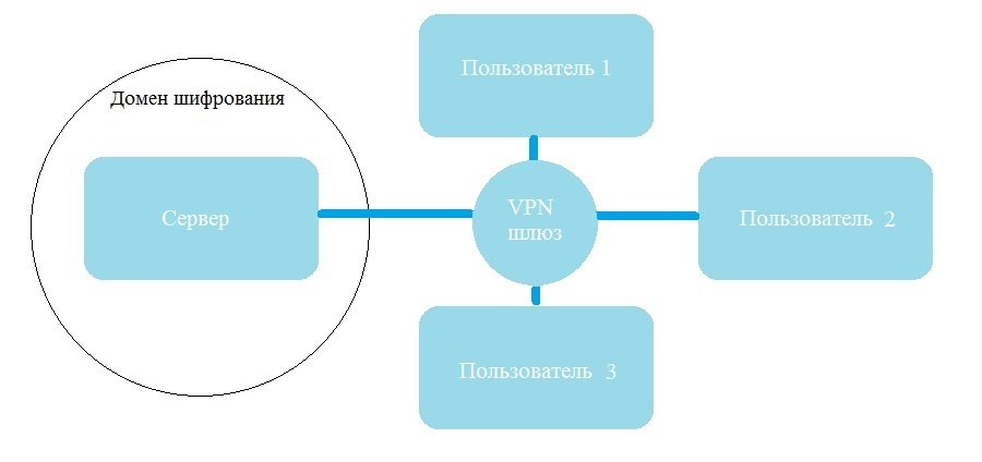 IPSec Les meilleurs vpn